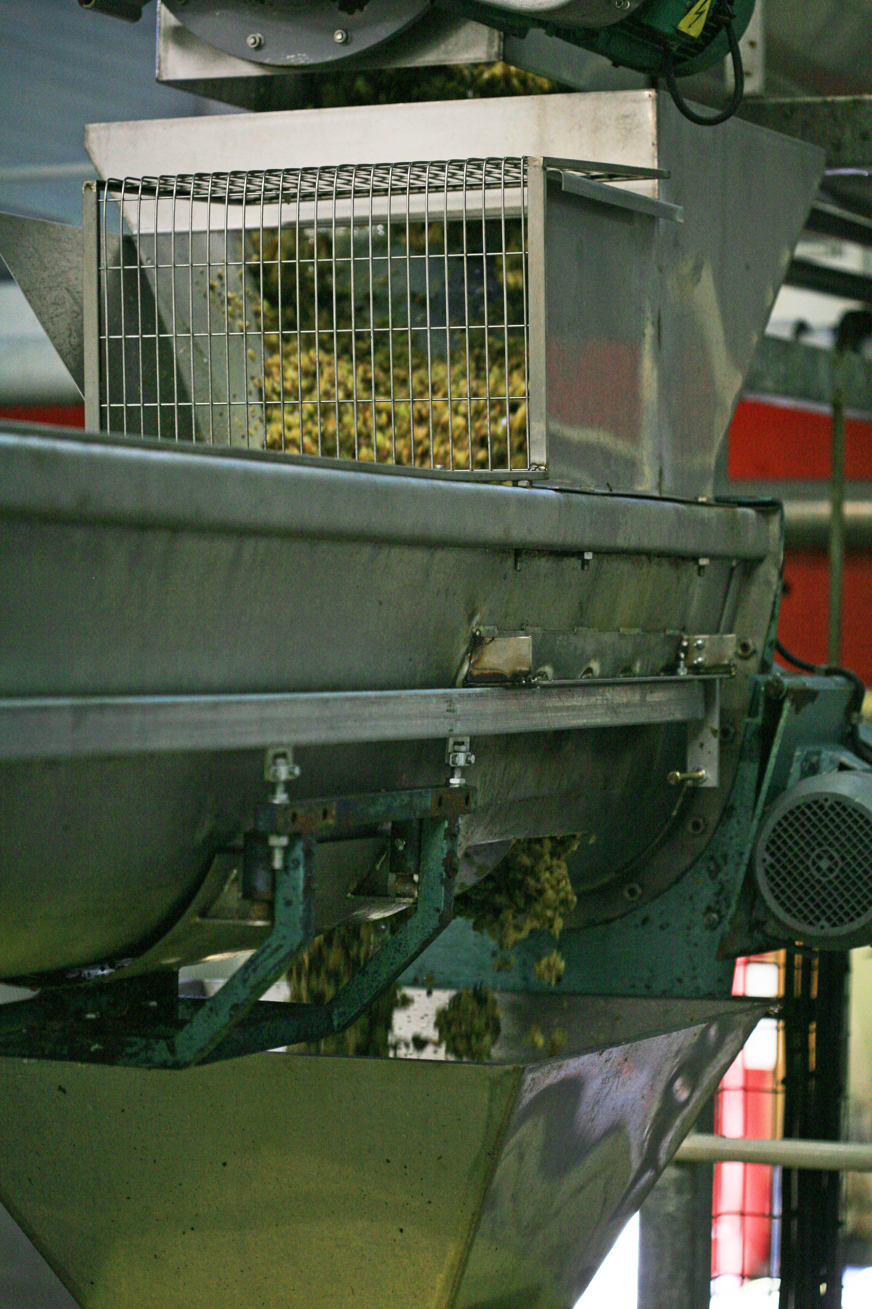 Abbeermaschine, cave de beaumes de venise, Vaucluse, France